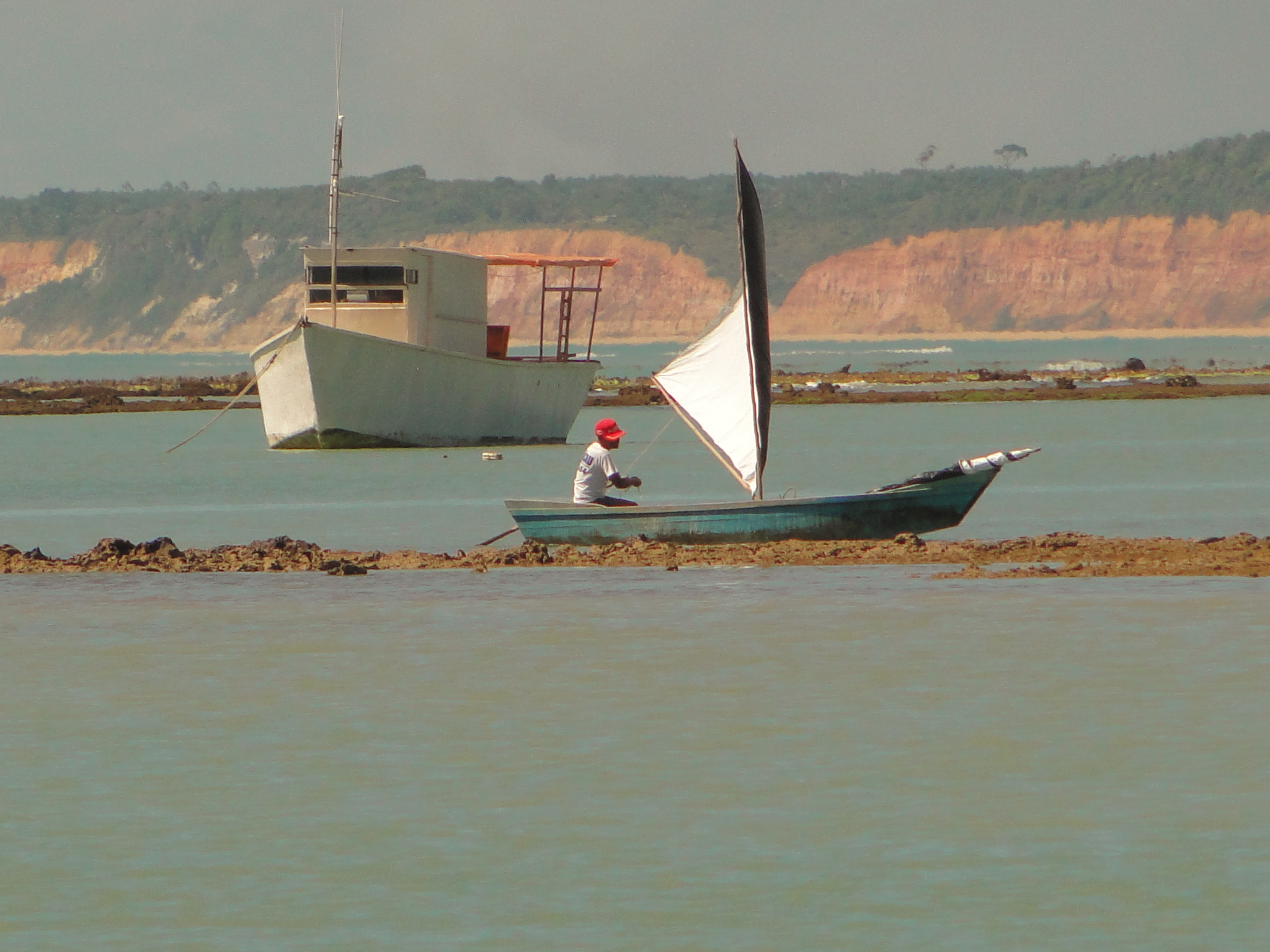 Cumuruxatiba-BA